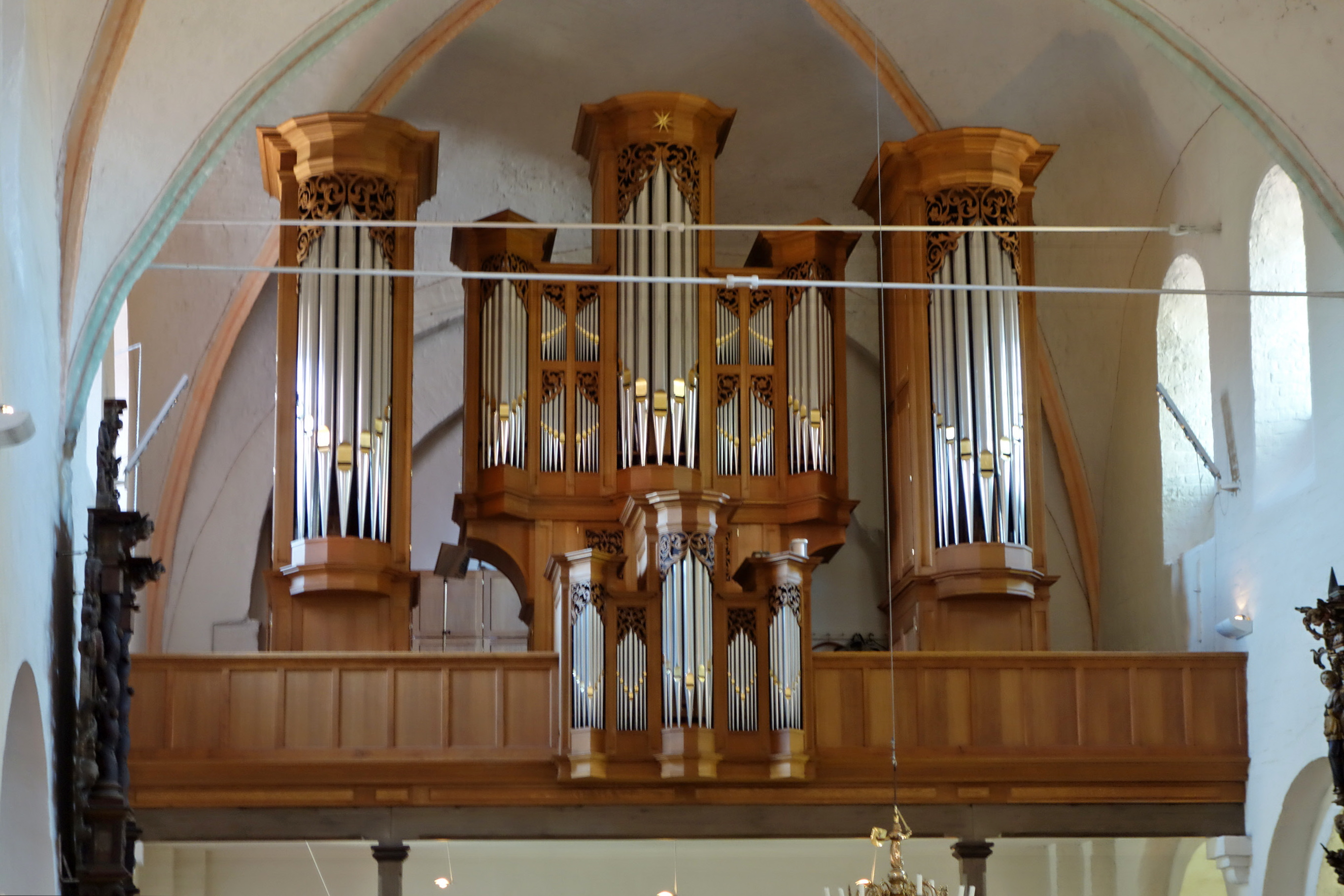 Orgel in Eutin, St. Michaelis, Schleswig-Holstein